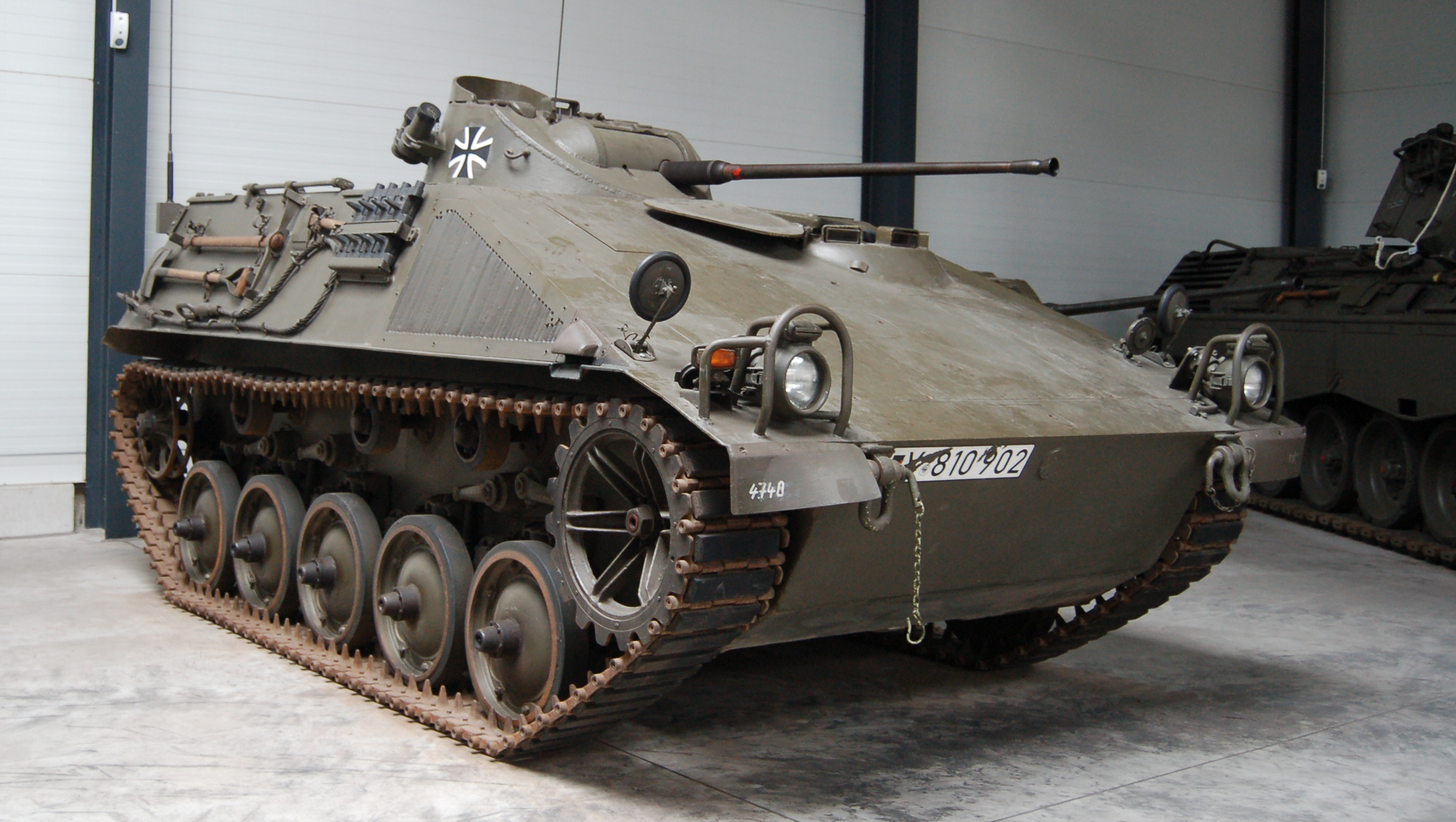 Schützenpanzer (kurz) Halbgruppe "Hotchkiss" Besatzung: 5 Soldaten Gewicht: 8,0 Tonnen Motorleistung: 121 kW (164 PS) Bewaffnung: 1 Maschinenkanone 20 mm L/85, Kaliber: 20 mm x 139 Baujahr: 1959 - 1964 Stückzahl gesammt: 2.374